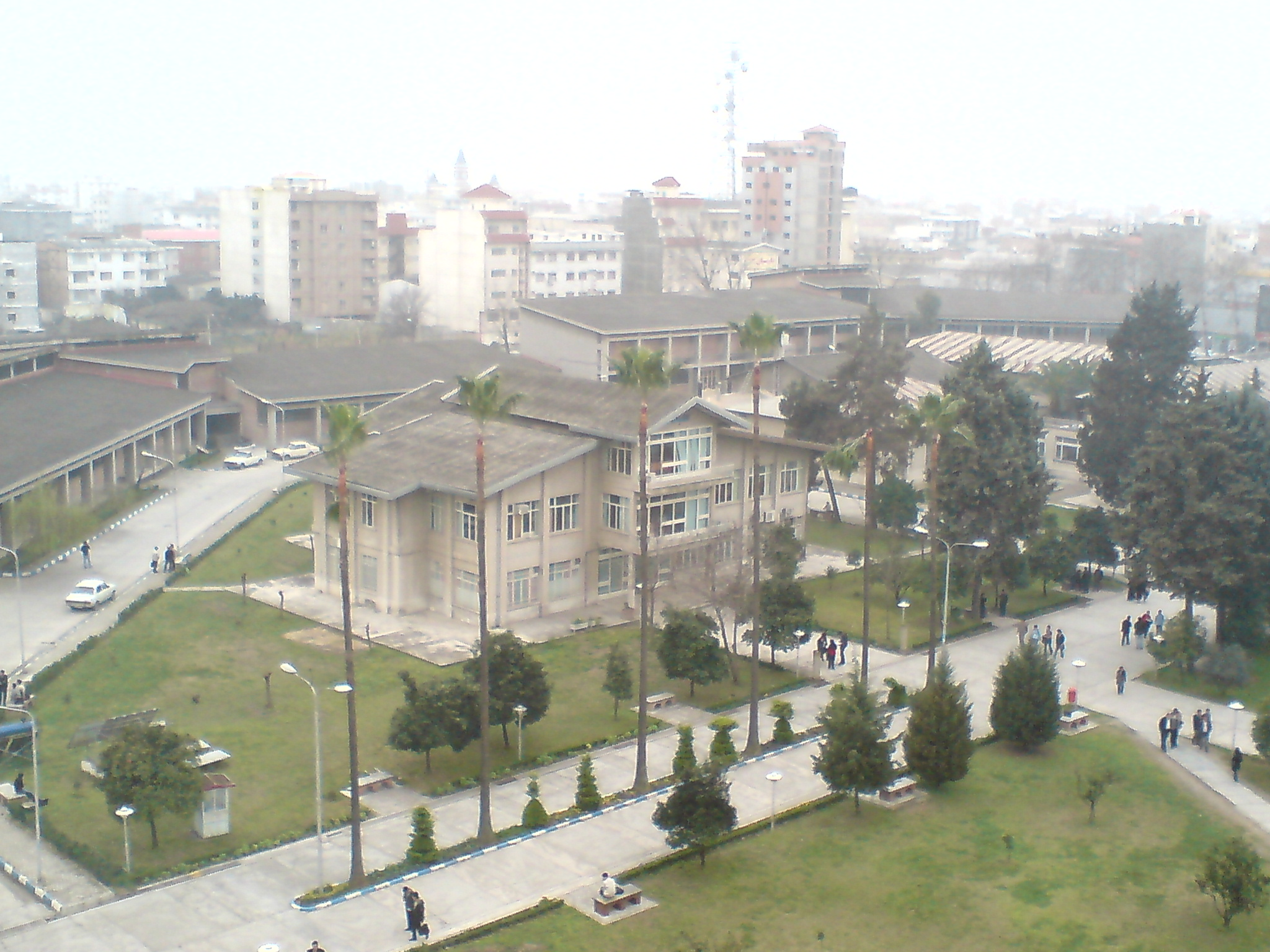 Library